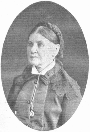 Таланова, Хиония Ивановна